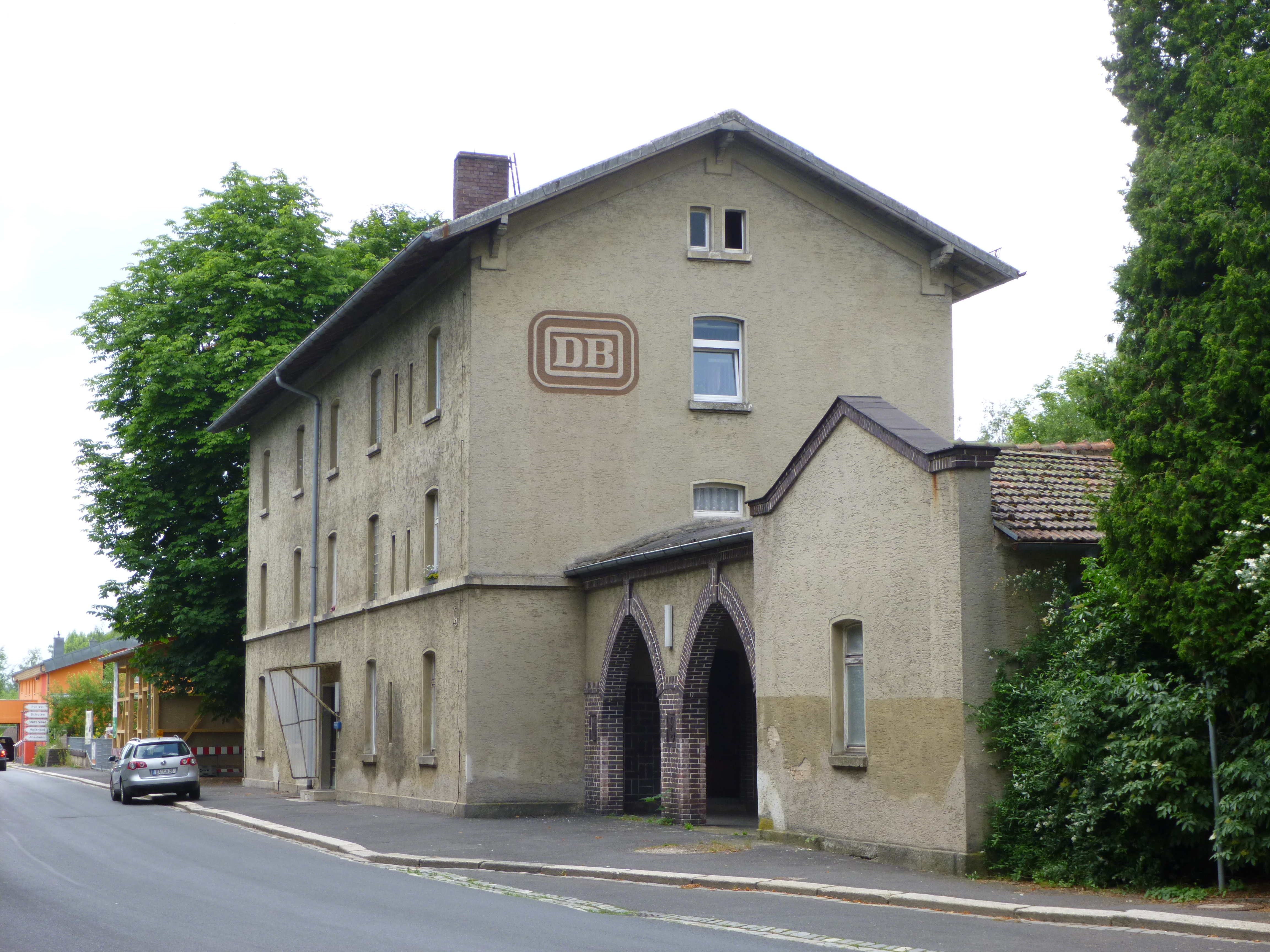 Nádraží Waldsassen